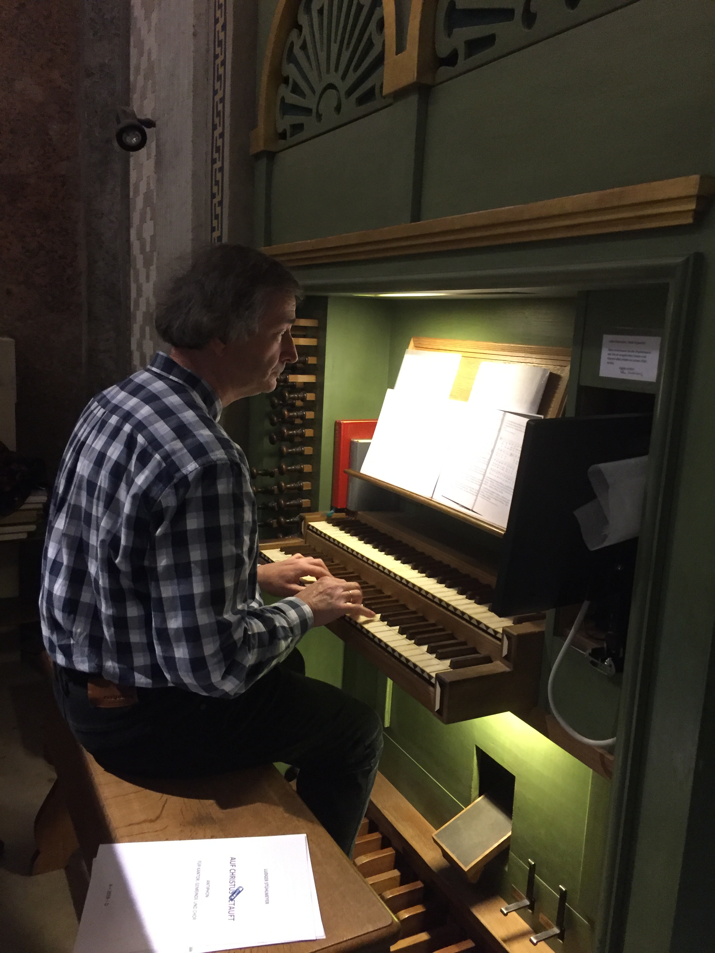 Musikdirektor Dr. Ludger Stühlmeyer bei einem Konzert im November 2019 in Rom